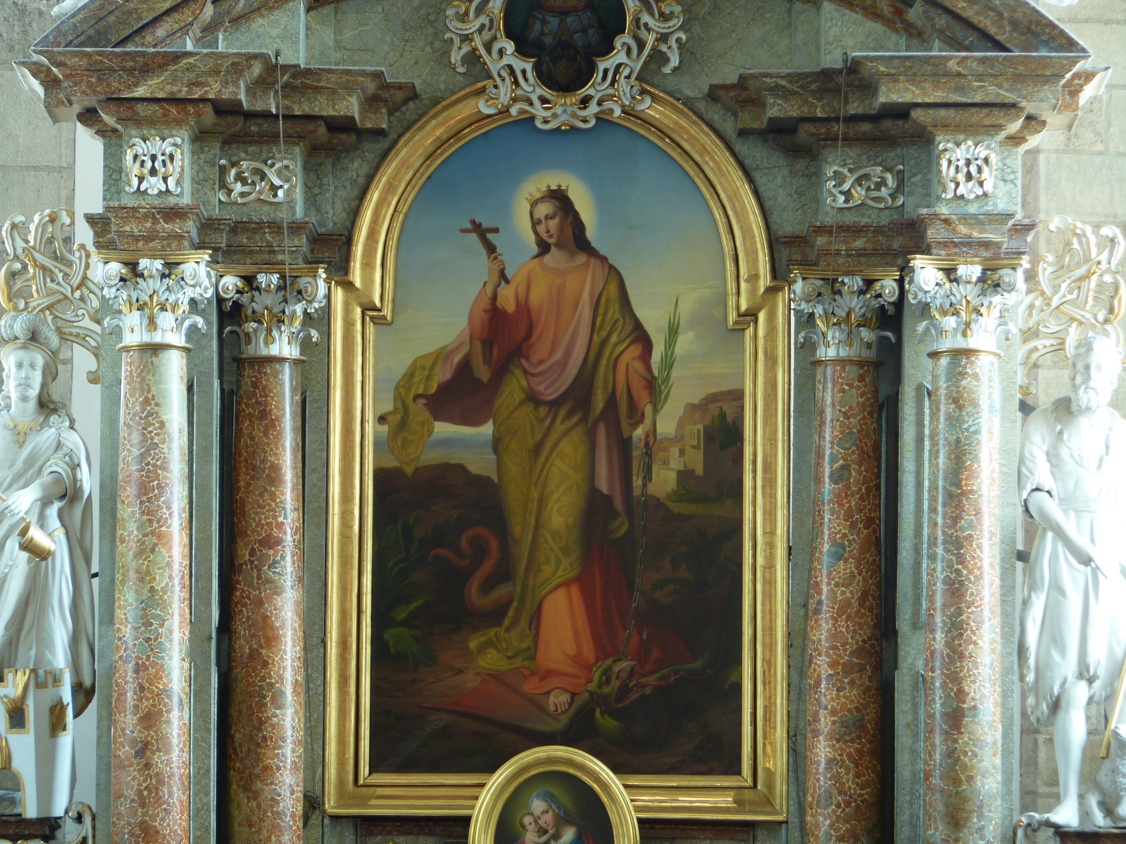 Hochaltarbild hl. Margarethe Über dem Hochaltarbild die Allianzwappen von Johann III. Anton Pálffy (1642 - 1694) und seine zweite Ehefrau Eleonora, geb. Mollart. Für Mollart Wappen siehe auch: oder